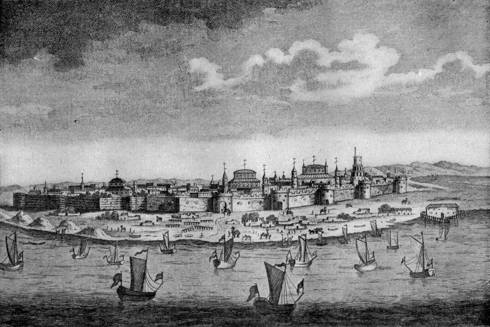 ASTRAKHAN IN RUSSIA.